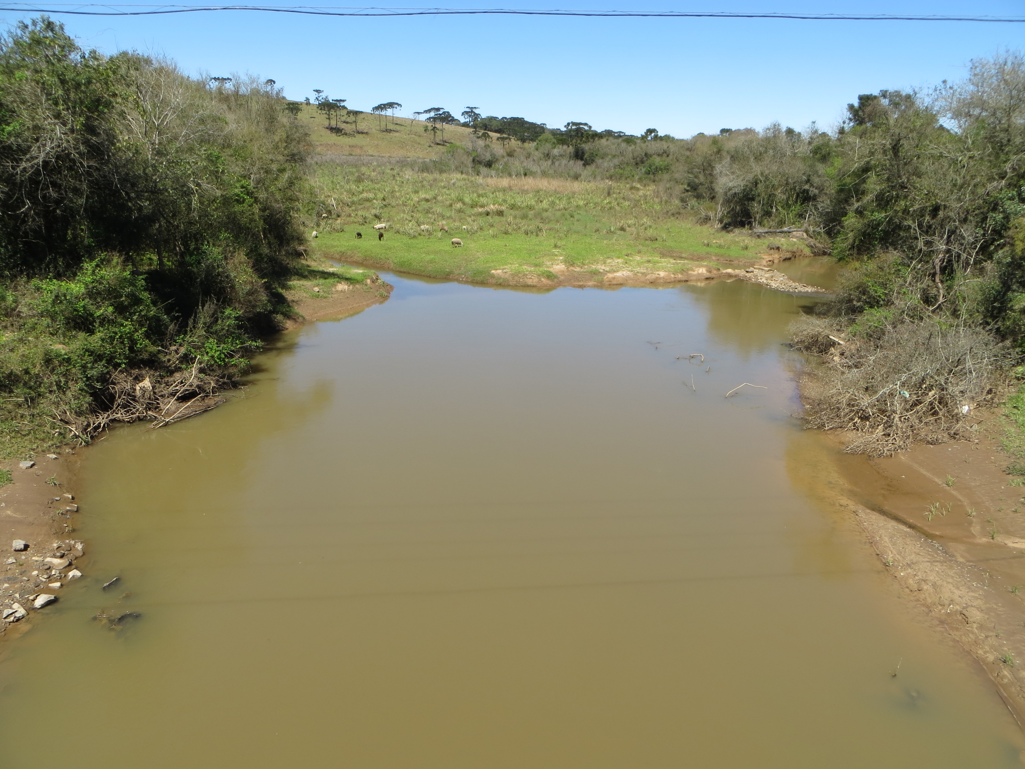 Rio da Vargem, no município de São João do Triunfo, estado brasileiro do Paraná, região sul do país.